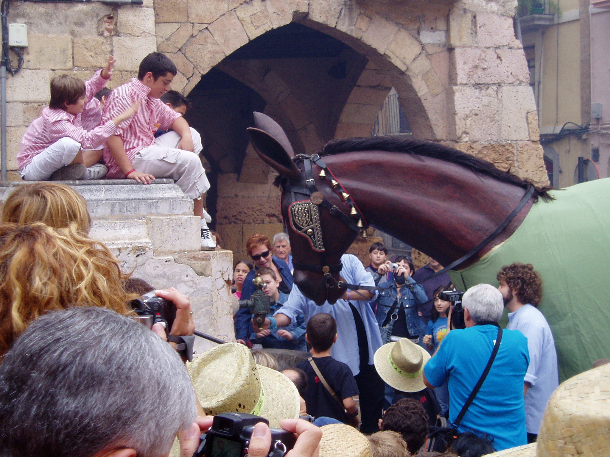 la mulassa refrescant-se